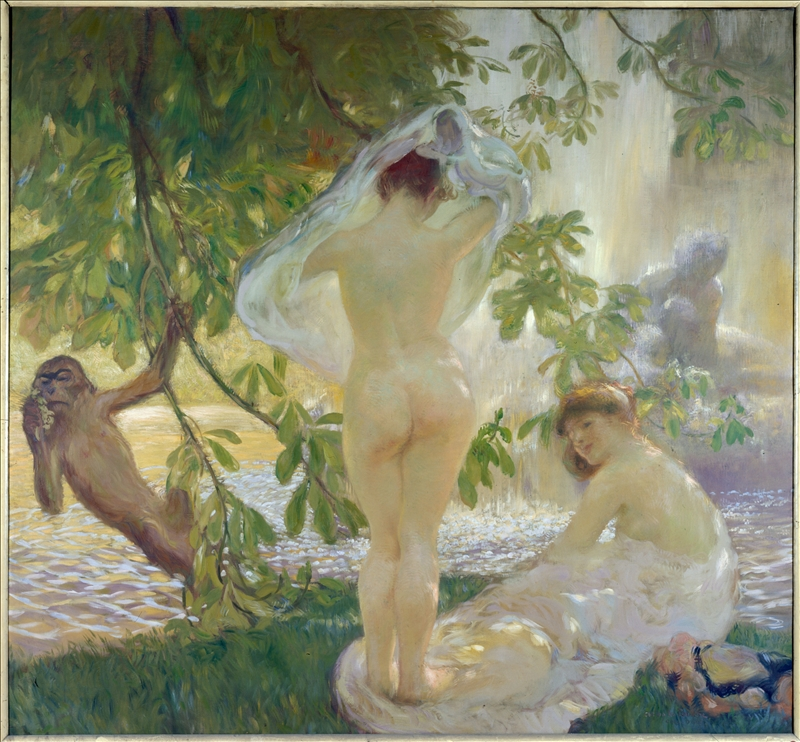 Gaston de La Touche (1854-1913). "La chemise enlevée" (1913). Huile sur toile, 208 x 226 cm. Fonds municipal d'art contemporain de la Ville de Paris.